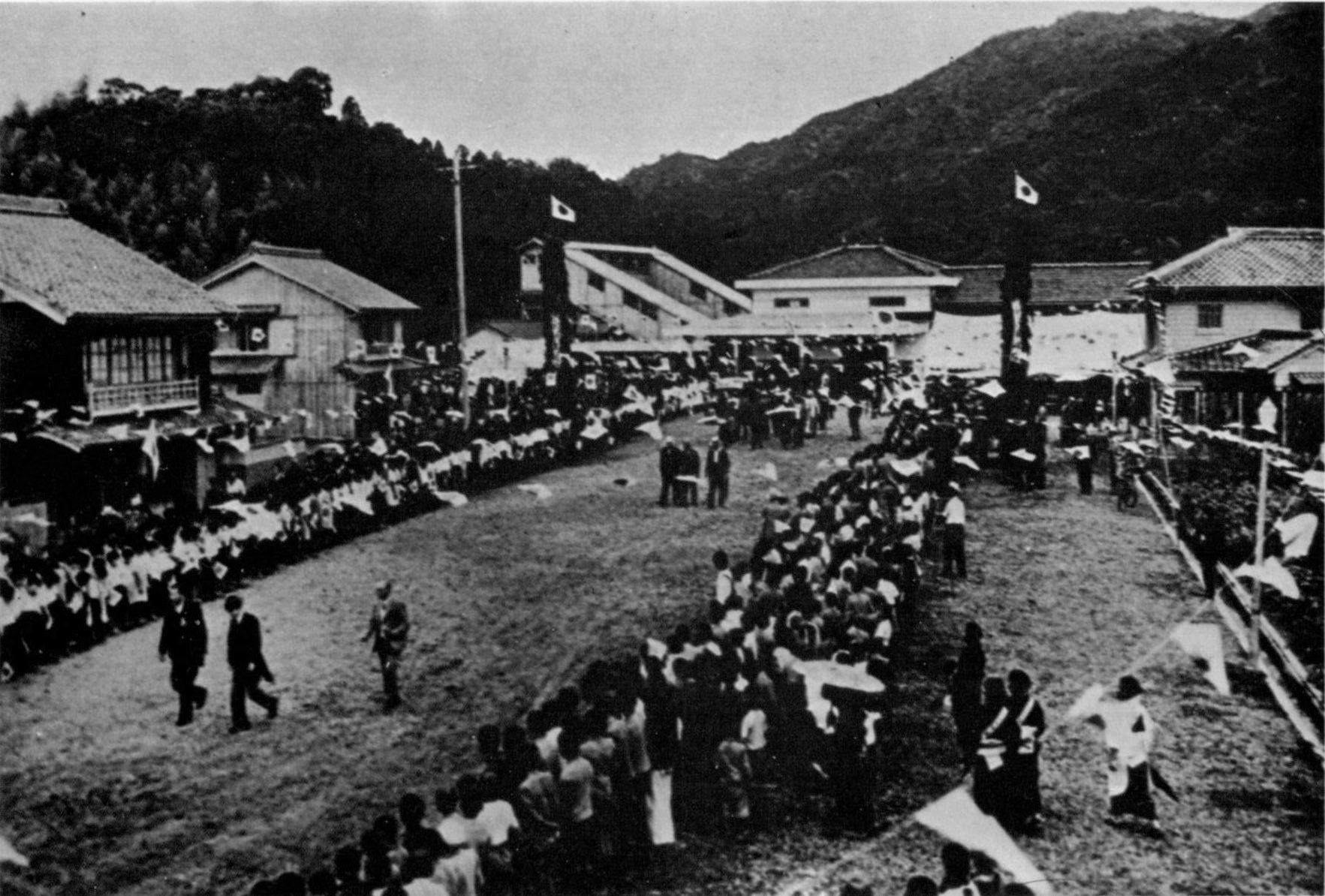 牟岐線全通当日の牟岐駅前。(徳島県海部郡、牟岐線)